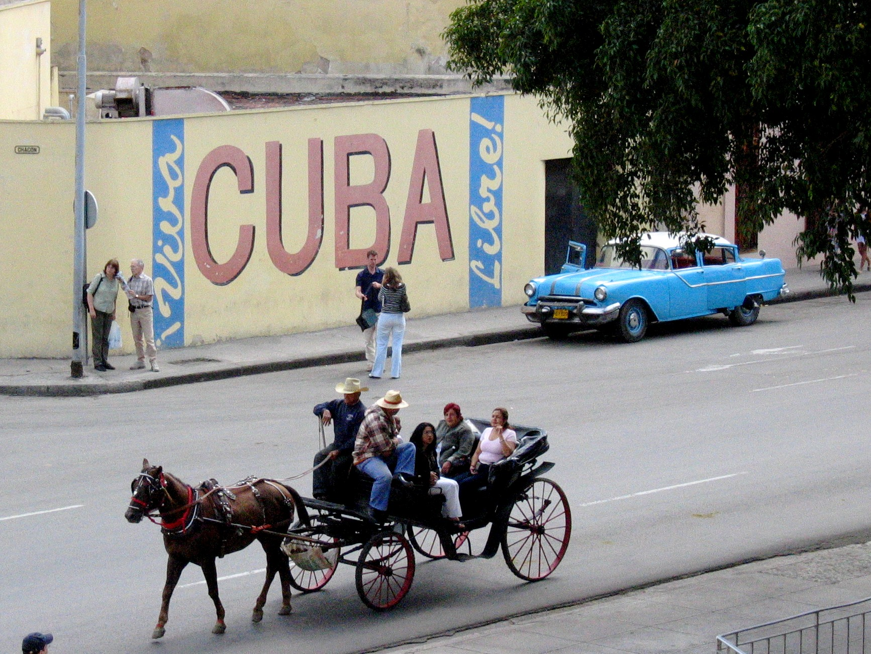 Einspänniger Viersitzer (Kuba) mit Klappverdeck.cuba 10